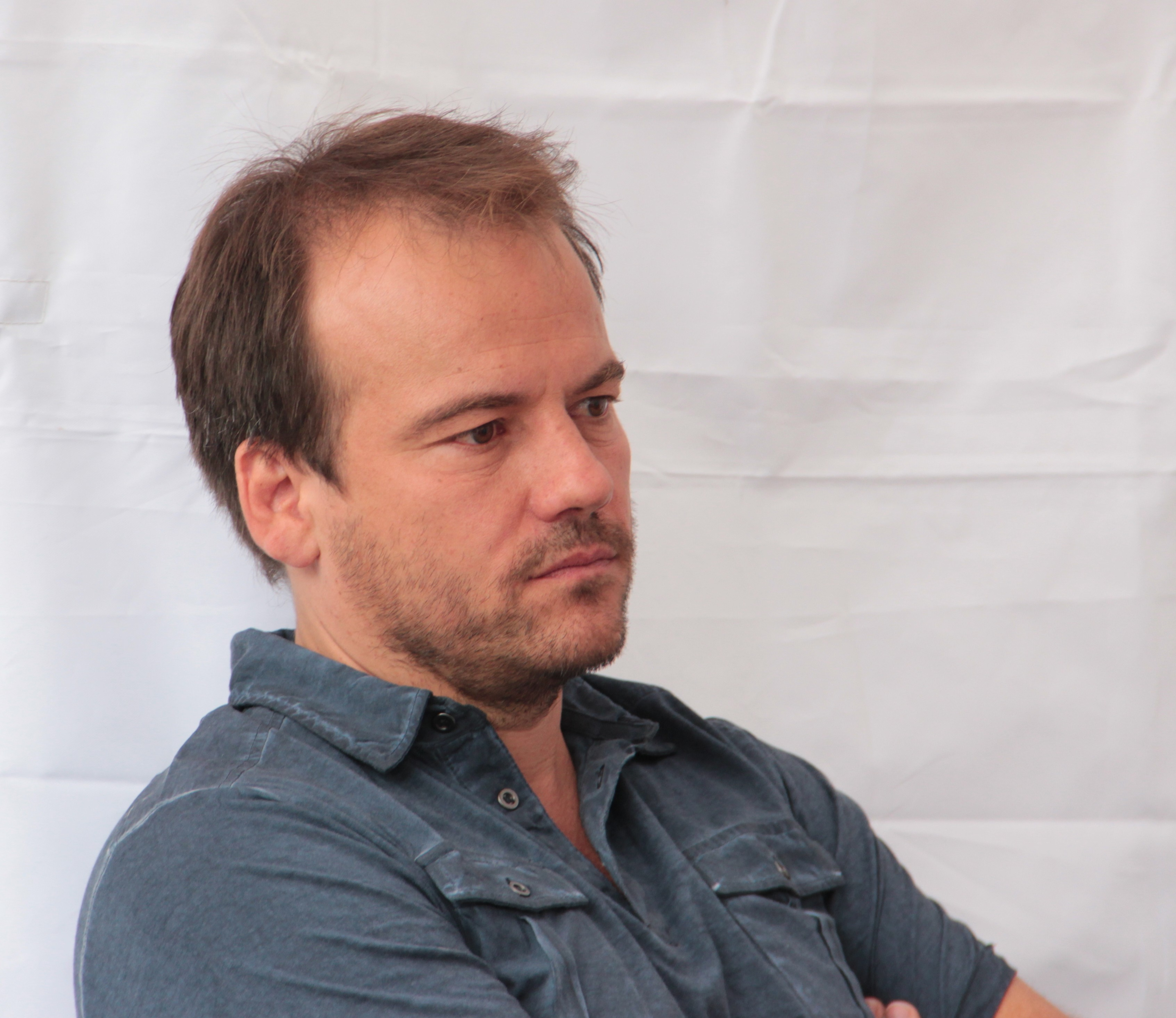 Le comédien Stéphane Henon lors du tournage de l'émission télévisée "Village départ".